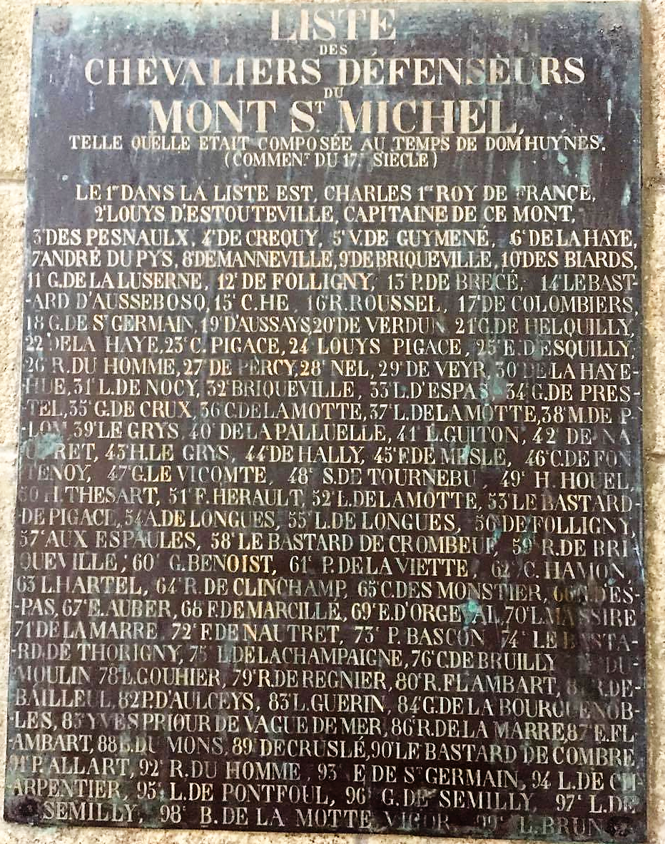 Plaque commemorative de la liste des chevaliers défenseurs du Mont Saint Michel telle quelle était composée au temps de DOM HUYNES au XVII e siècle. Située dans le transept droit de l'abbaye du Mont Saint Michel.